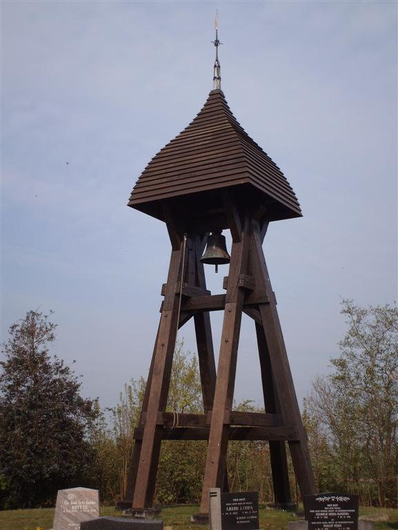 Klokkenstoel in Rotstergaast. Wooden bell tower.